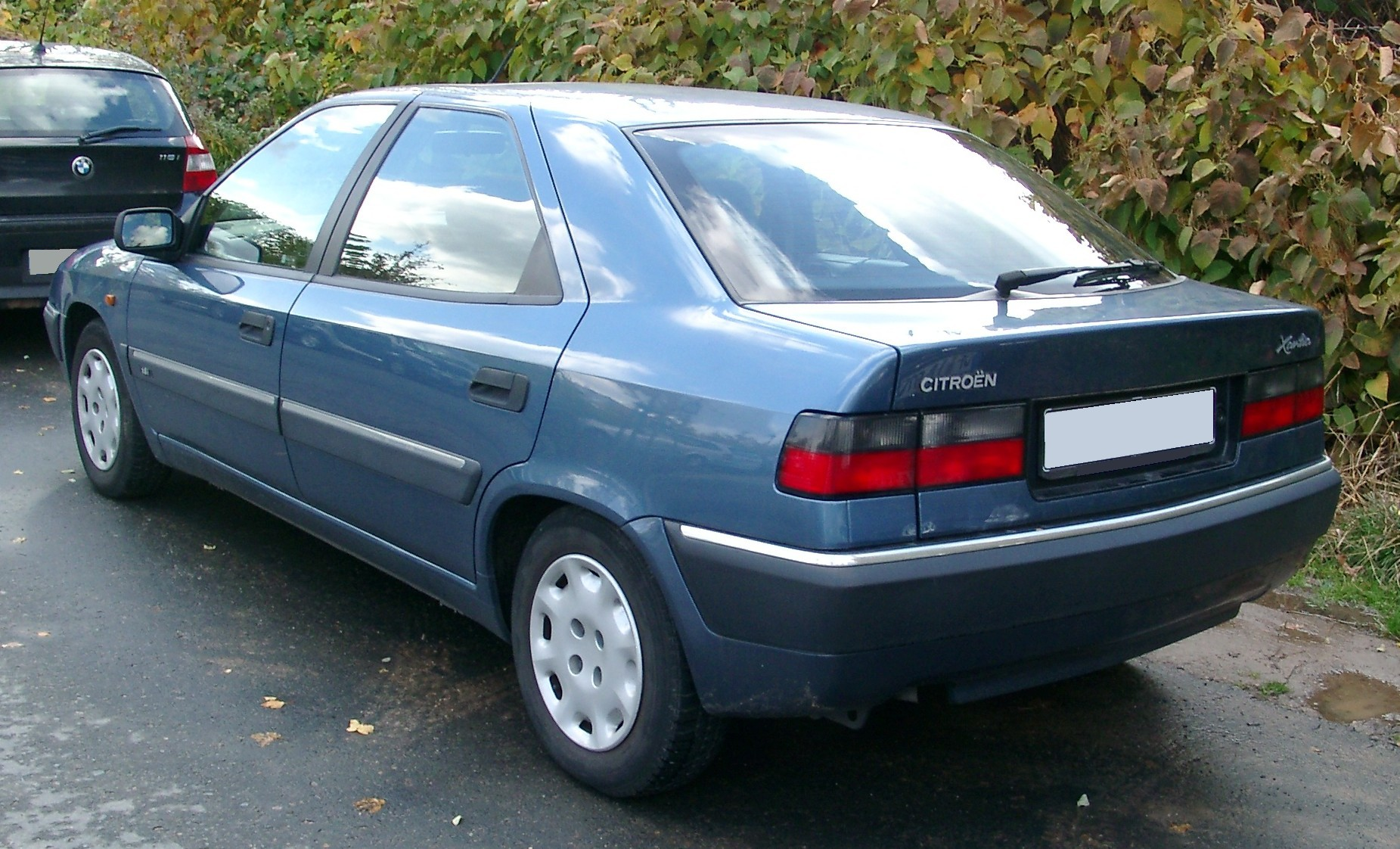 Citroën Xantia